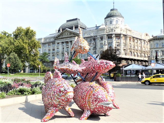 Uniseafish at the Pest bridgehead of Lánchíd, Budapest on the 17 of September, 2018.